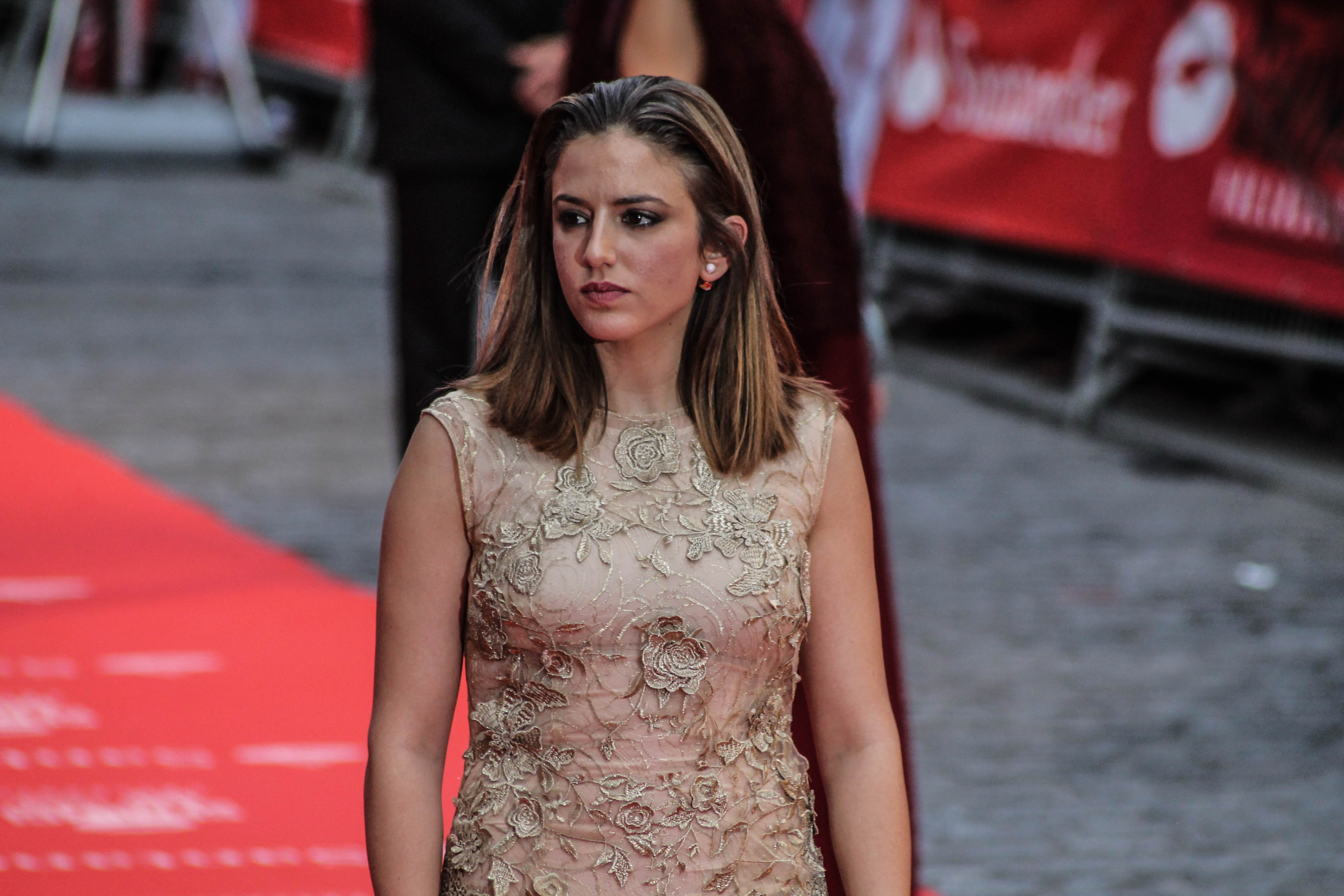 Marina Salas en la Seminci 2015